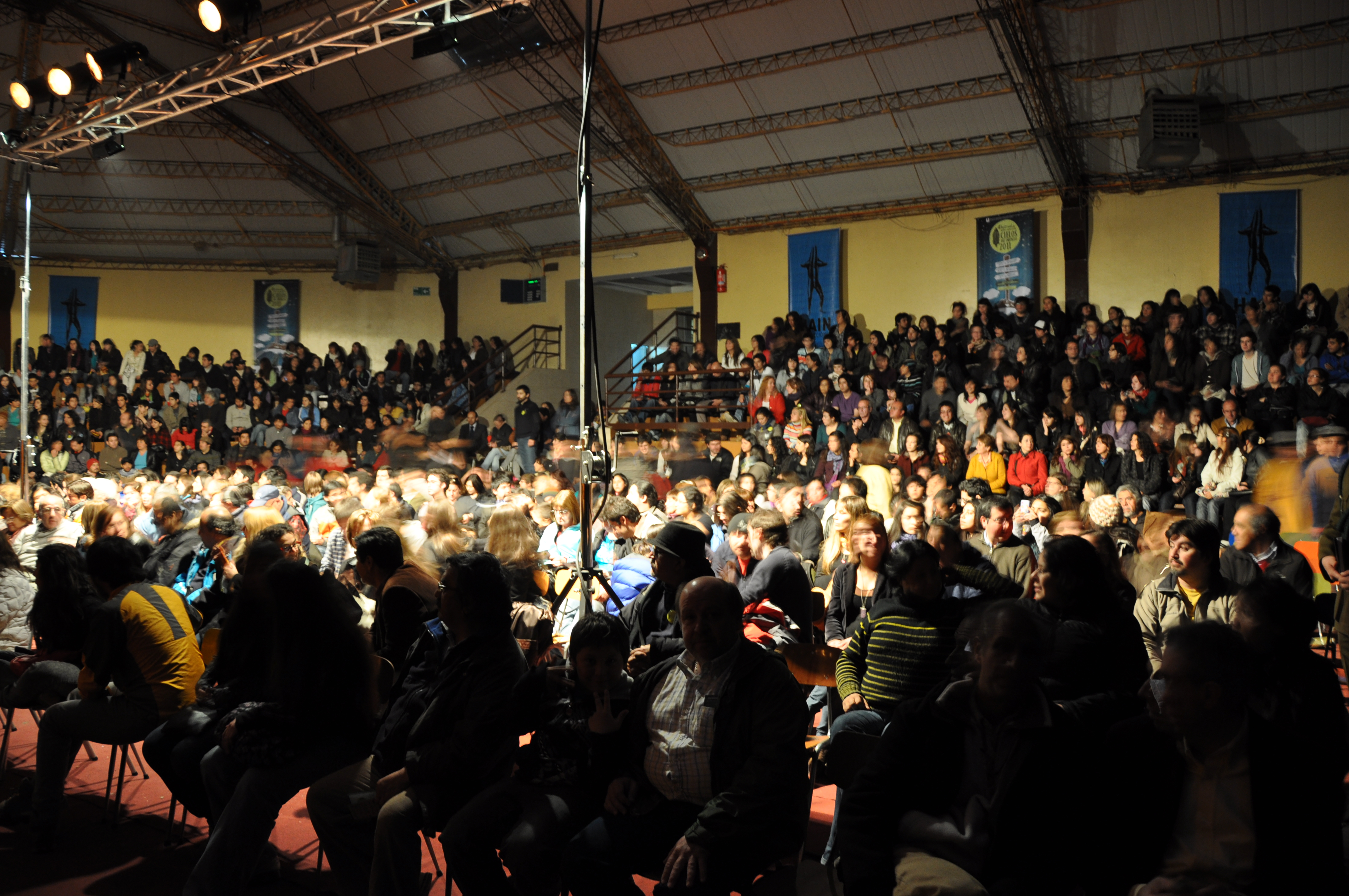 Publikum bei einer Aufführung des Theaterfestivals "Cielos del Infinito" in der Turnhalle des Liceo San José in Punta Arenas.